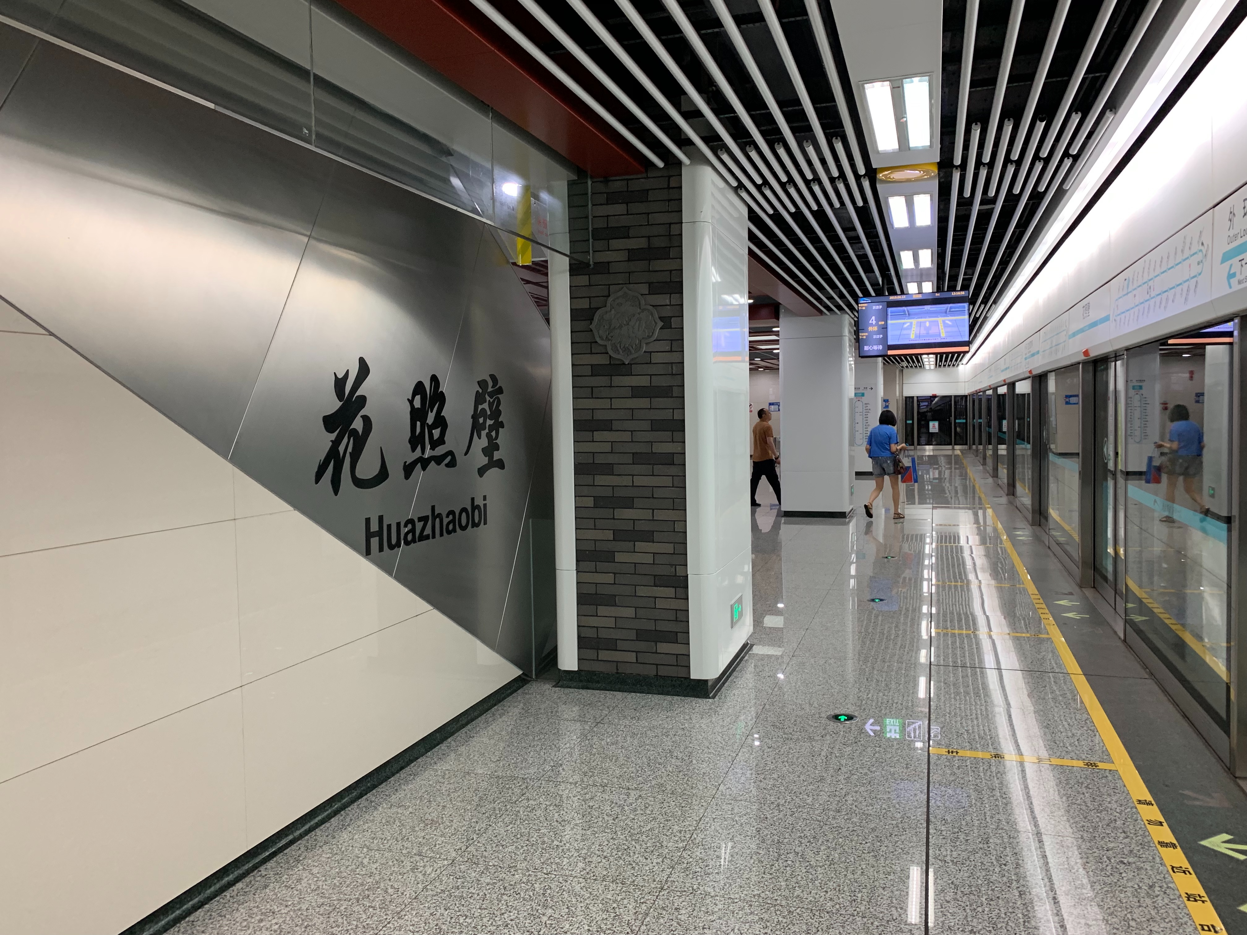 成都地铁花照壁站